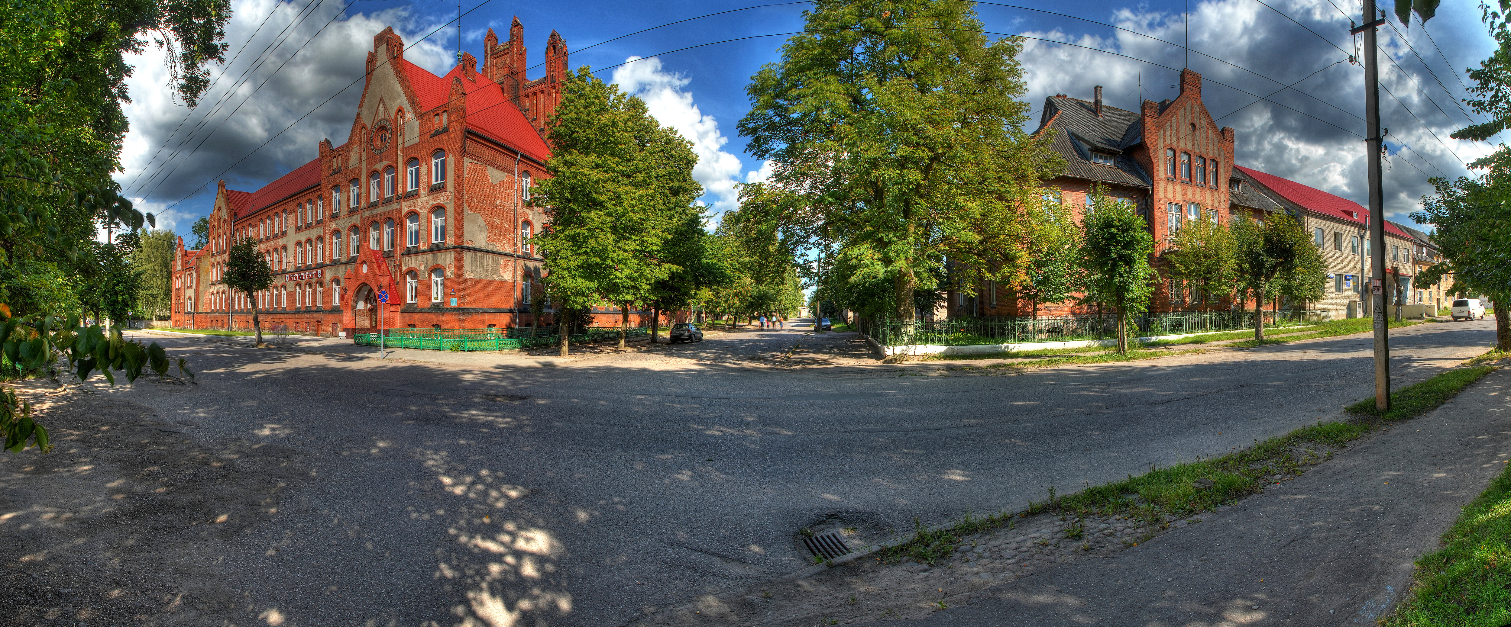 Здание школы им. фридриха («фридрихшуле») (Калиниградская область, Гусев, тимирязева улица, 3)